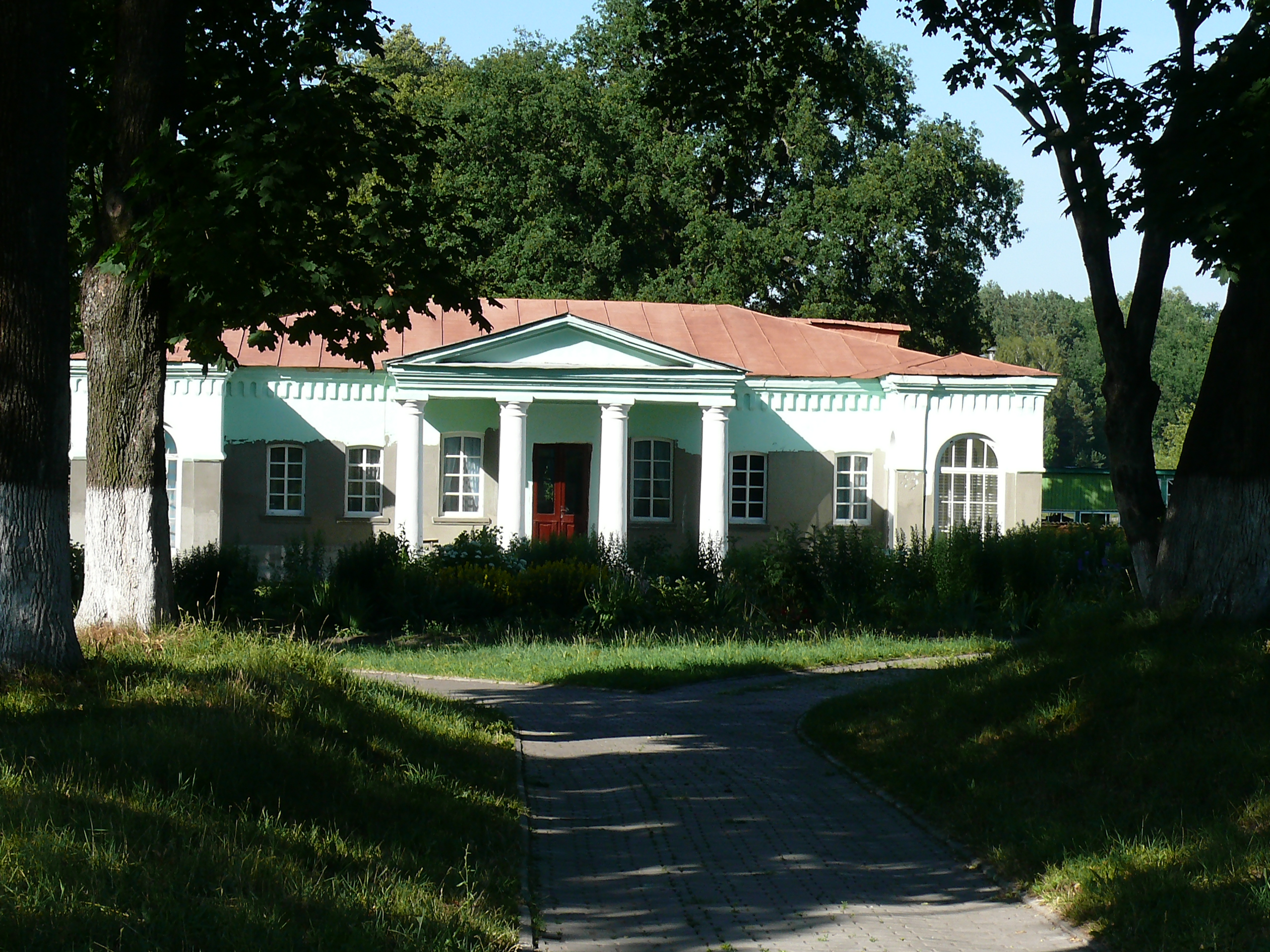 Садибний будинок Рудзинських, у якому перебував Тарас Шевченко (м. Кролевець Сумської обл., вул. Горького, 64)